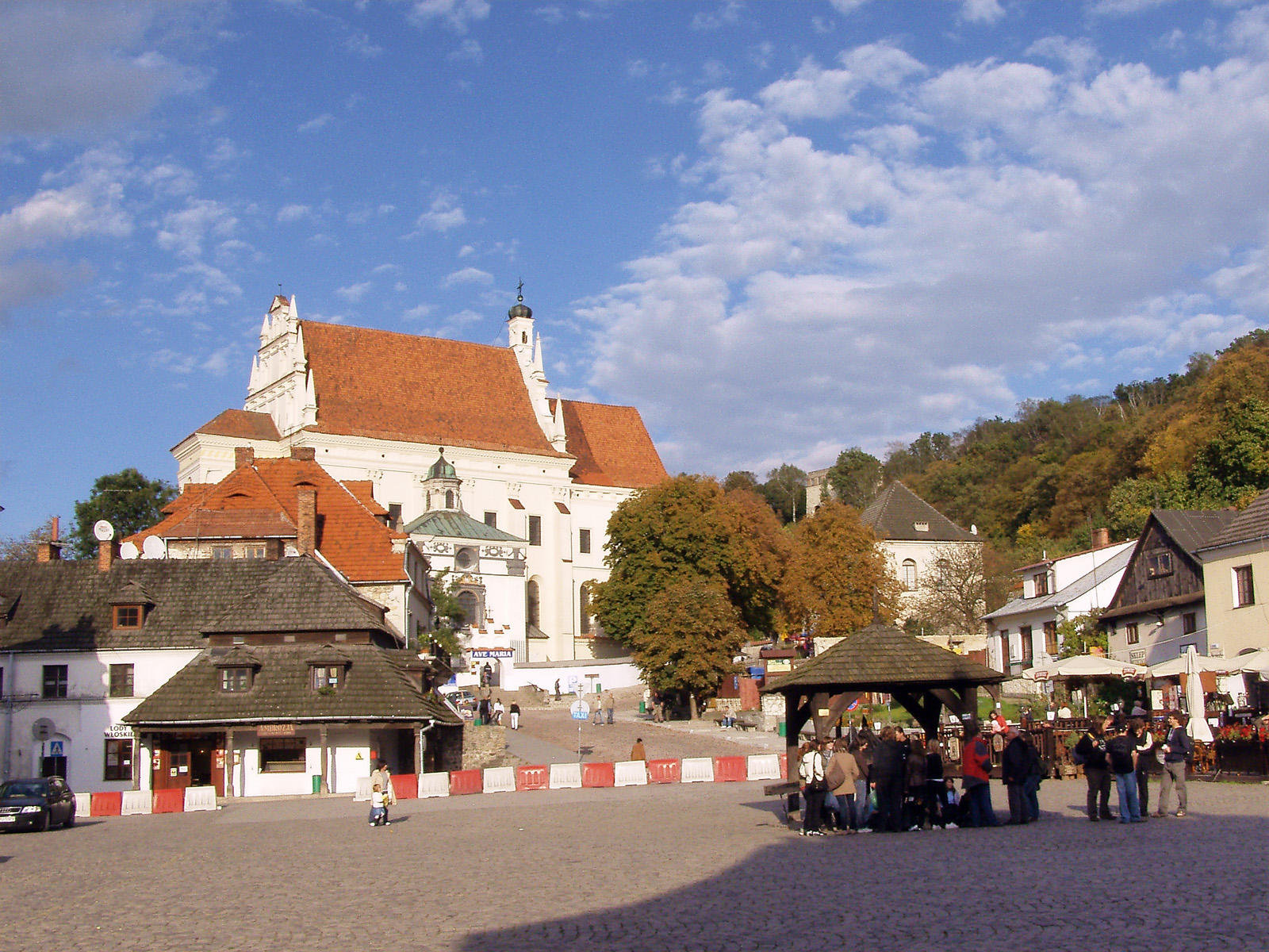 Kazimierz Dolny, Jesien 2008.